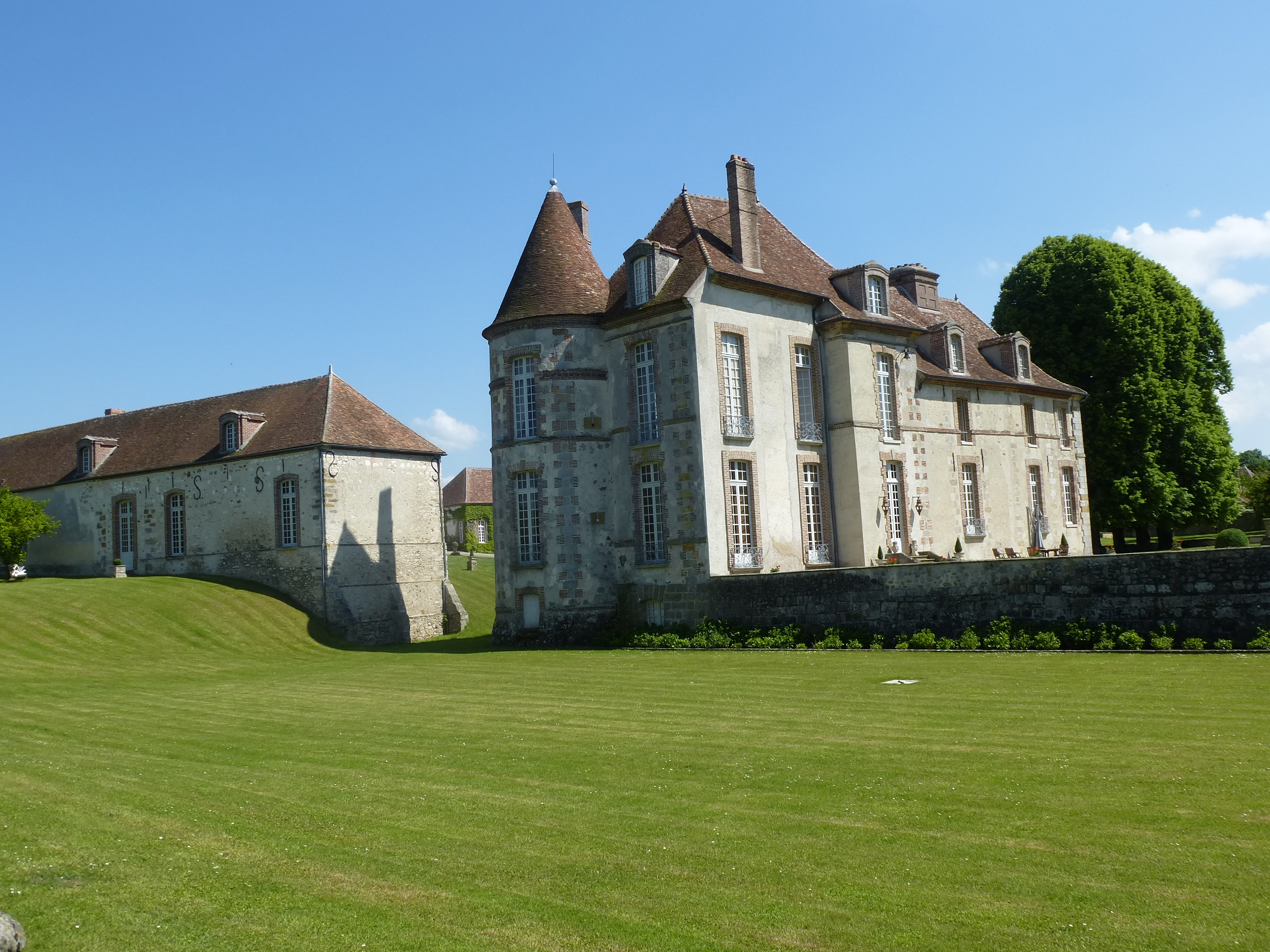 Château de Villeceaux. (commune de Jaulnes, département de la Seine-et-Marne, région Île-de-France).